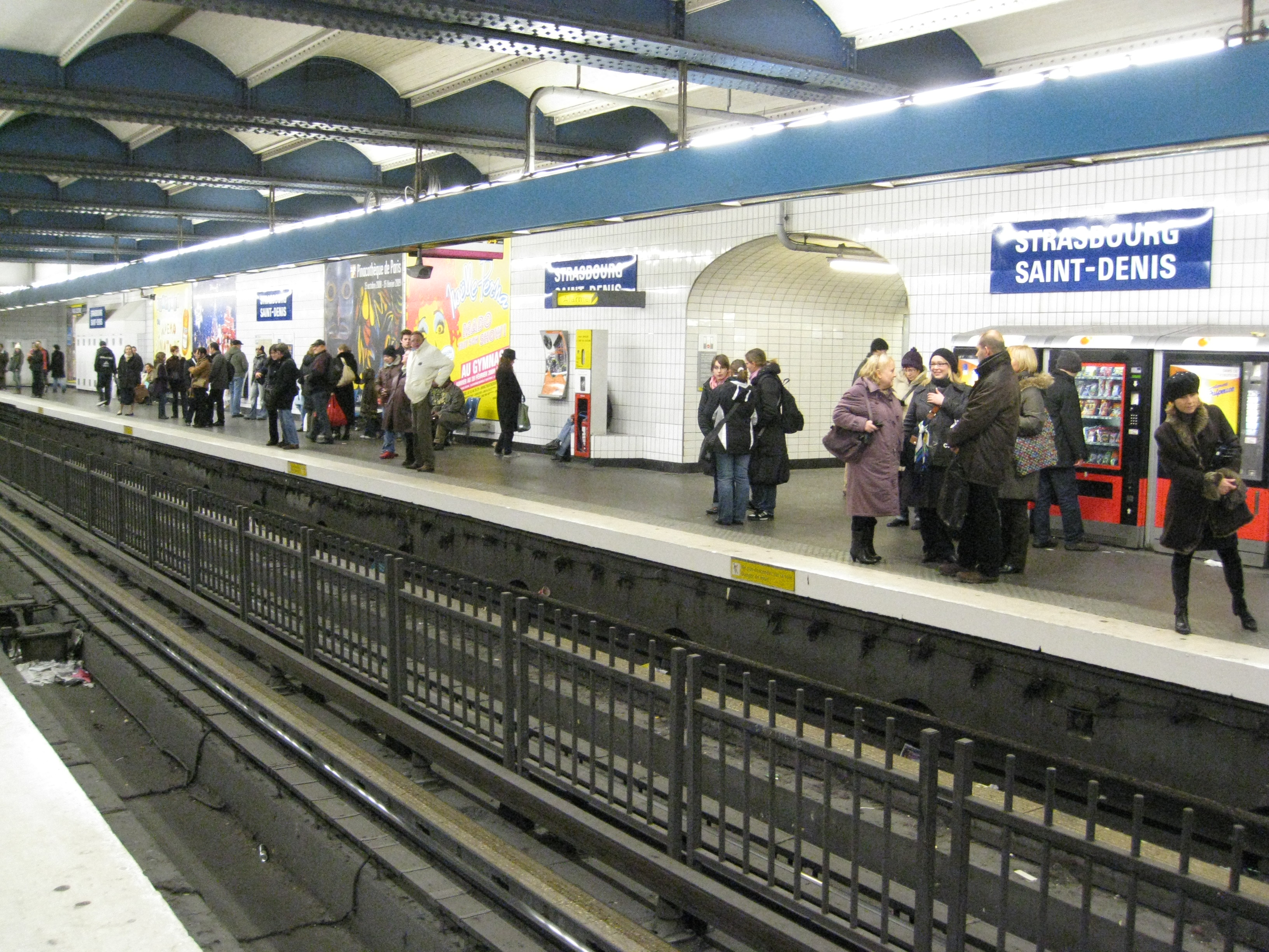 Station Strasbourg - Saint-Denis, ligne 4 du métro de Paris, France.